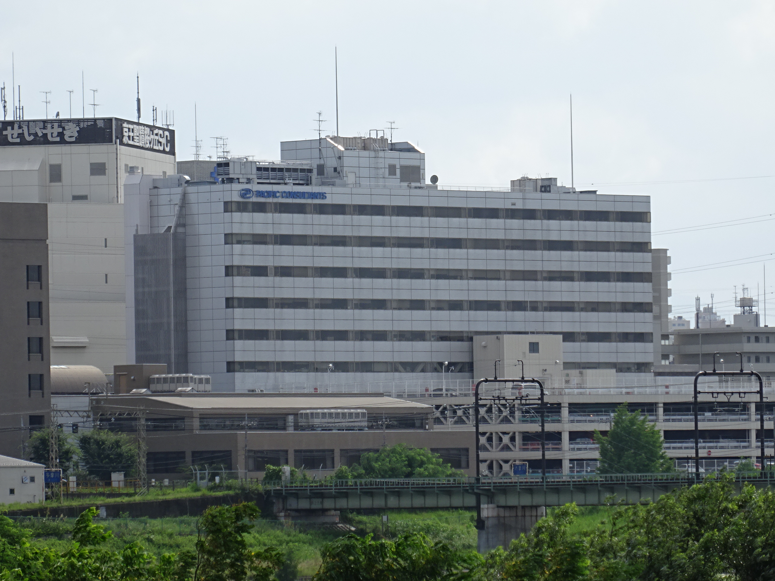 多摩市にあるパシフィックコンサルタンツ本社（15/07/17撮影）